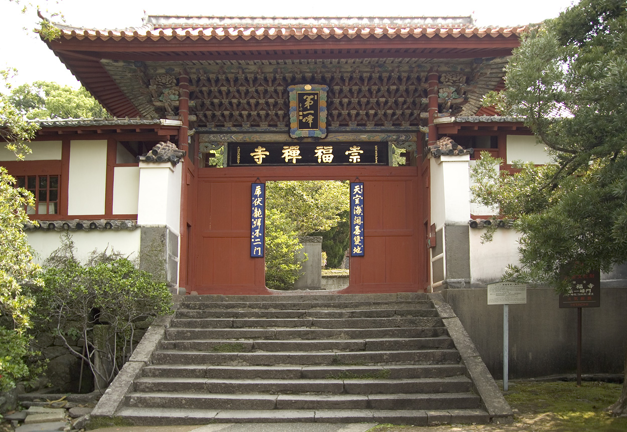 第一峰門（海天門、唐門、二の門、中門、赤門）江戸時代 at Sōfuku-ji in Nagasaki, Japan. National Treasure